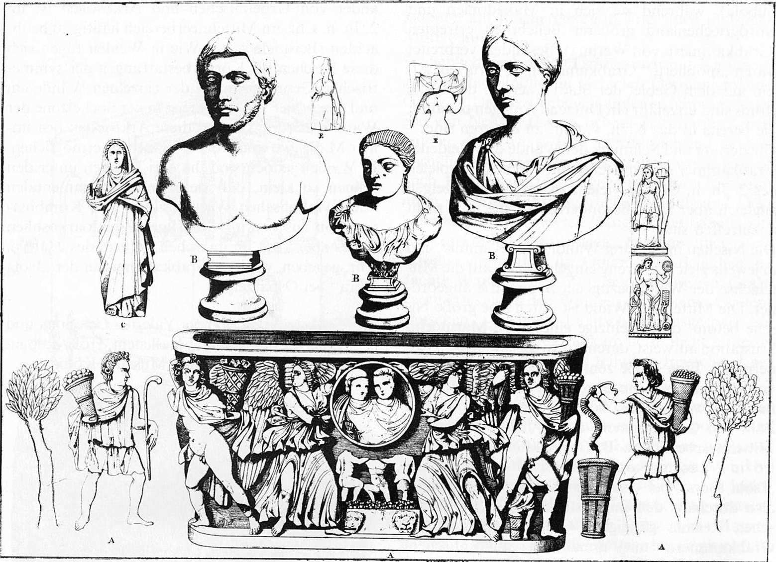 Stich des Inventars des Römergrabes Köln-Weiden.